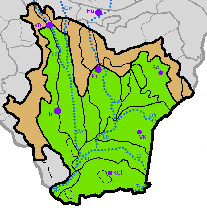 Členění geomorfologické oblasti Východoslovenská nížina. Schematicky jsou znázorněny též nejvýznamnější vodní toky a města. Východoslovenská rovina Východoslovenská pahorkatina řeky / rivers Bo – Bodrog Lb – Laborec Lt – Latorica On – Ondava Ti – Tisa To – Topľa Uh – Uh města / towns Hu Humenné KCh – Kráľovský Chlmec Mi – Michalovce So – Sobrance Tr – Trebišov VnT – Vranov nad Topľou VK – Veľké Kapušany